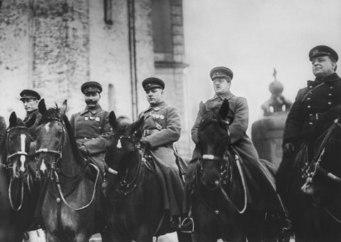 Огледальное изображение уже опубликованной фотографии